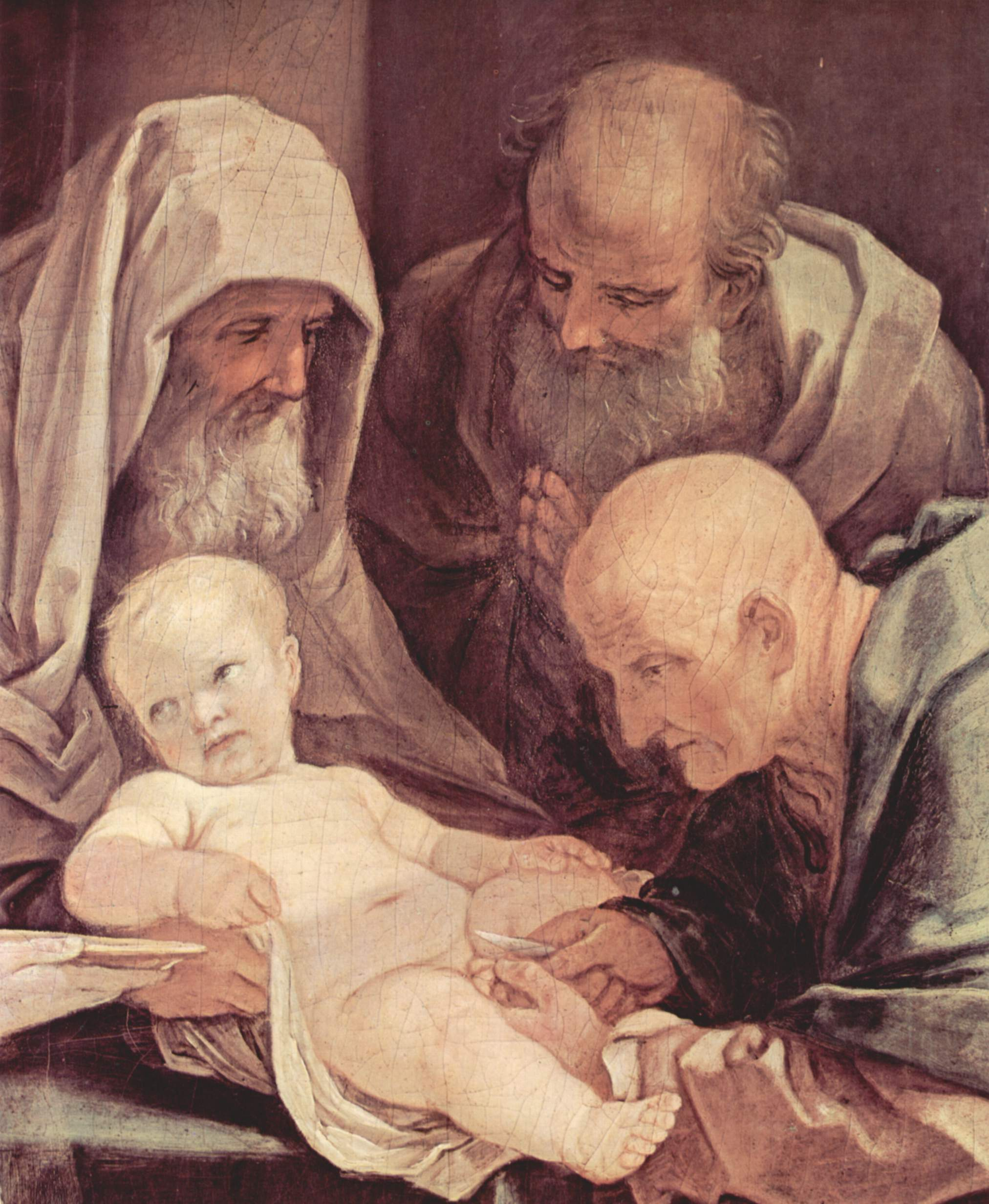 detail